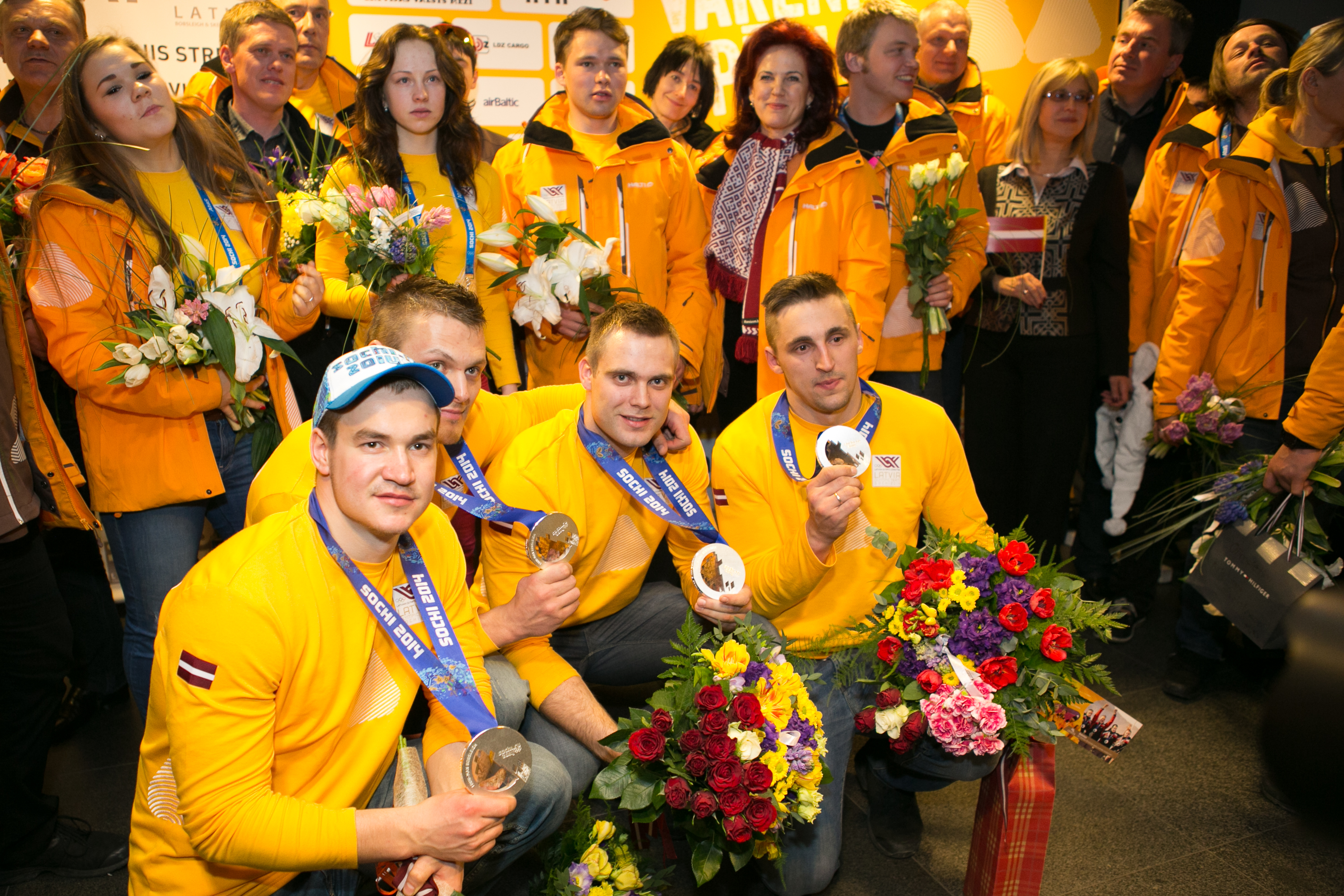 Latvijas Olimpiskās komandas sagaidīšana lidostā "Rīga"